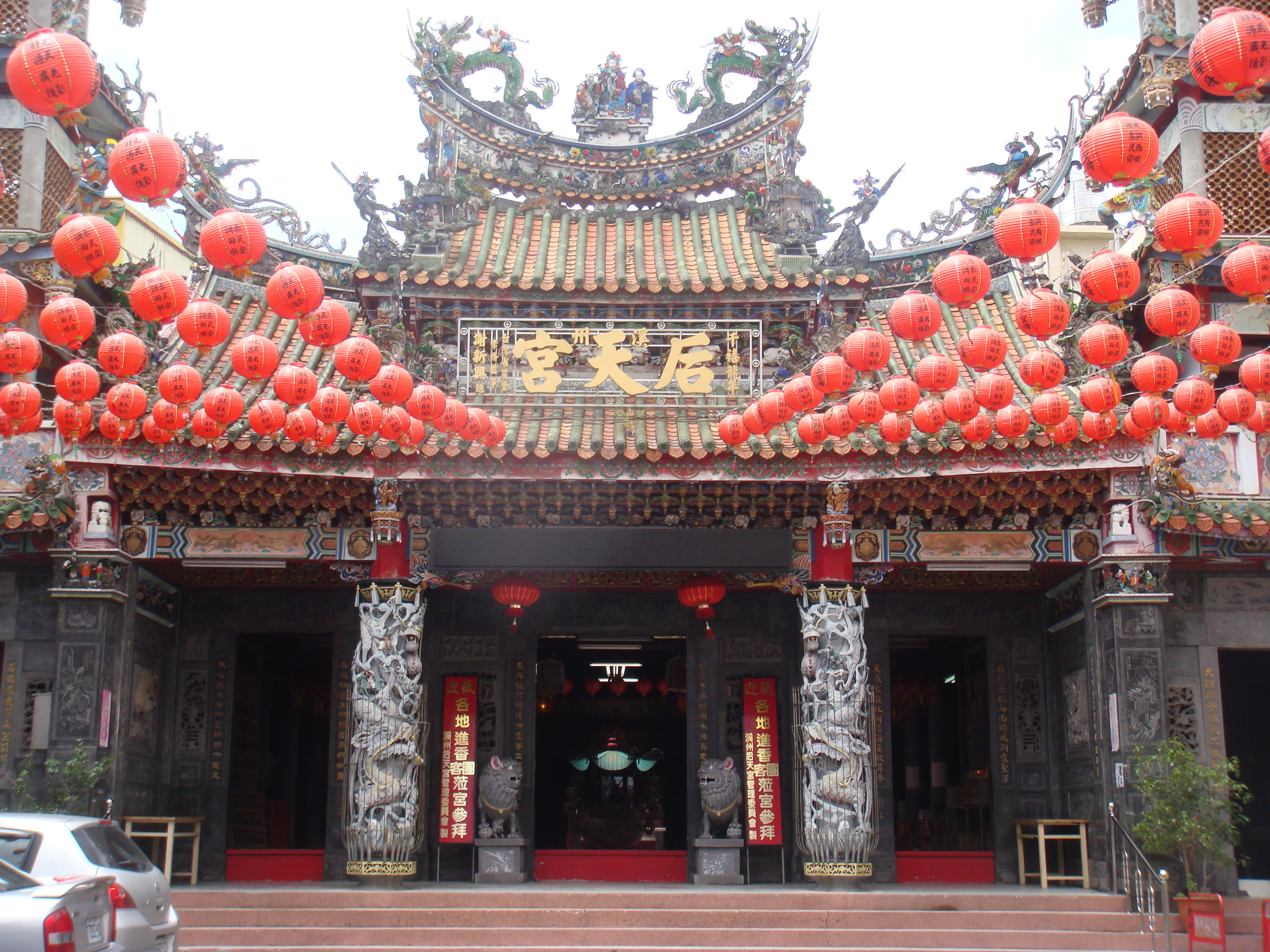 溪州鄉后天宮